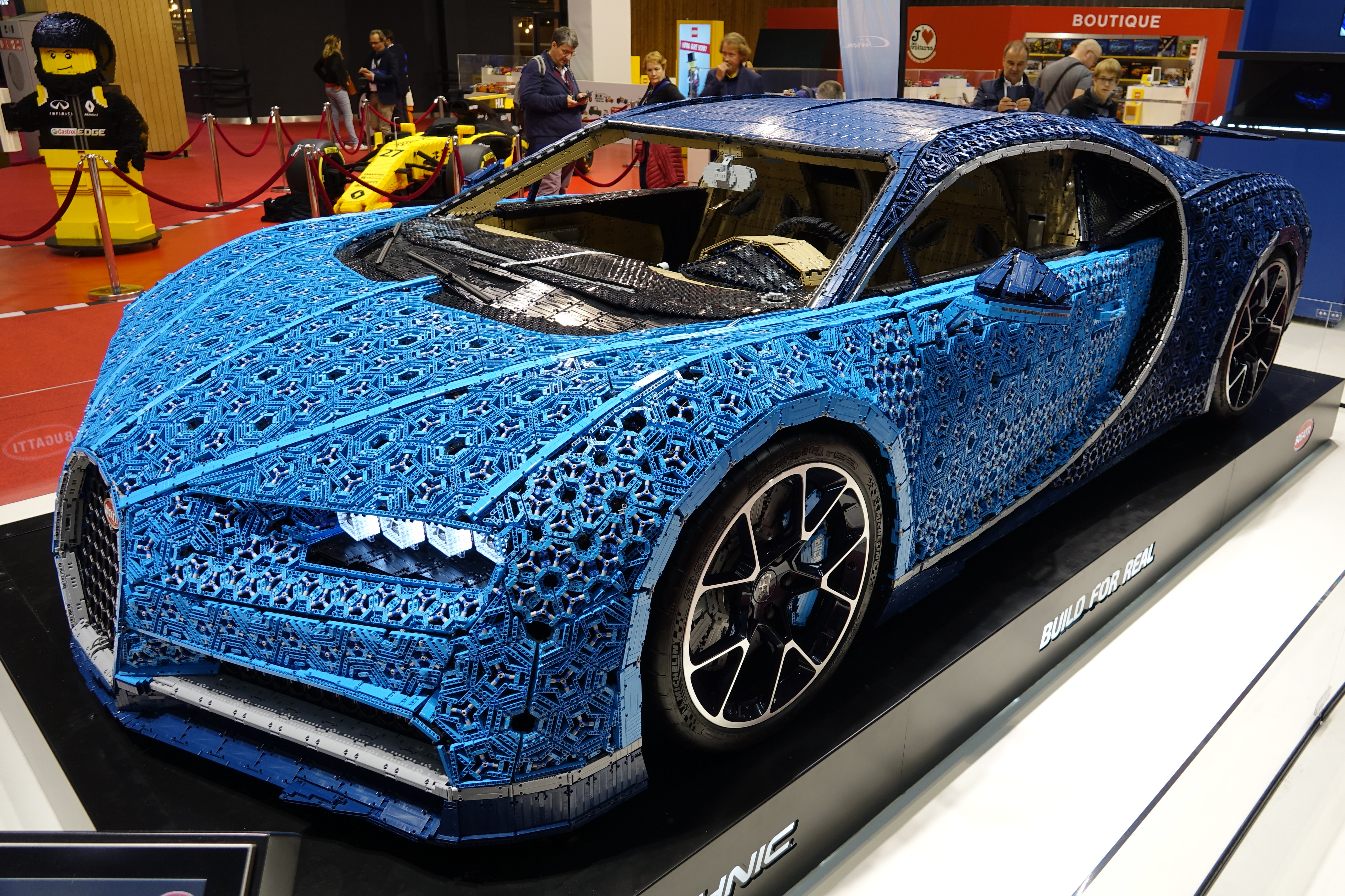 Bugatti Chiron Lego au Mondial de l'Auto 2018